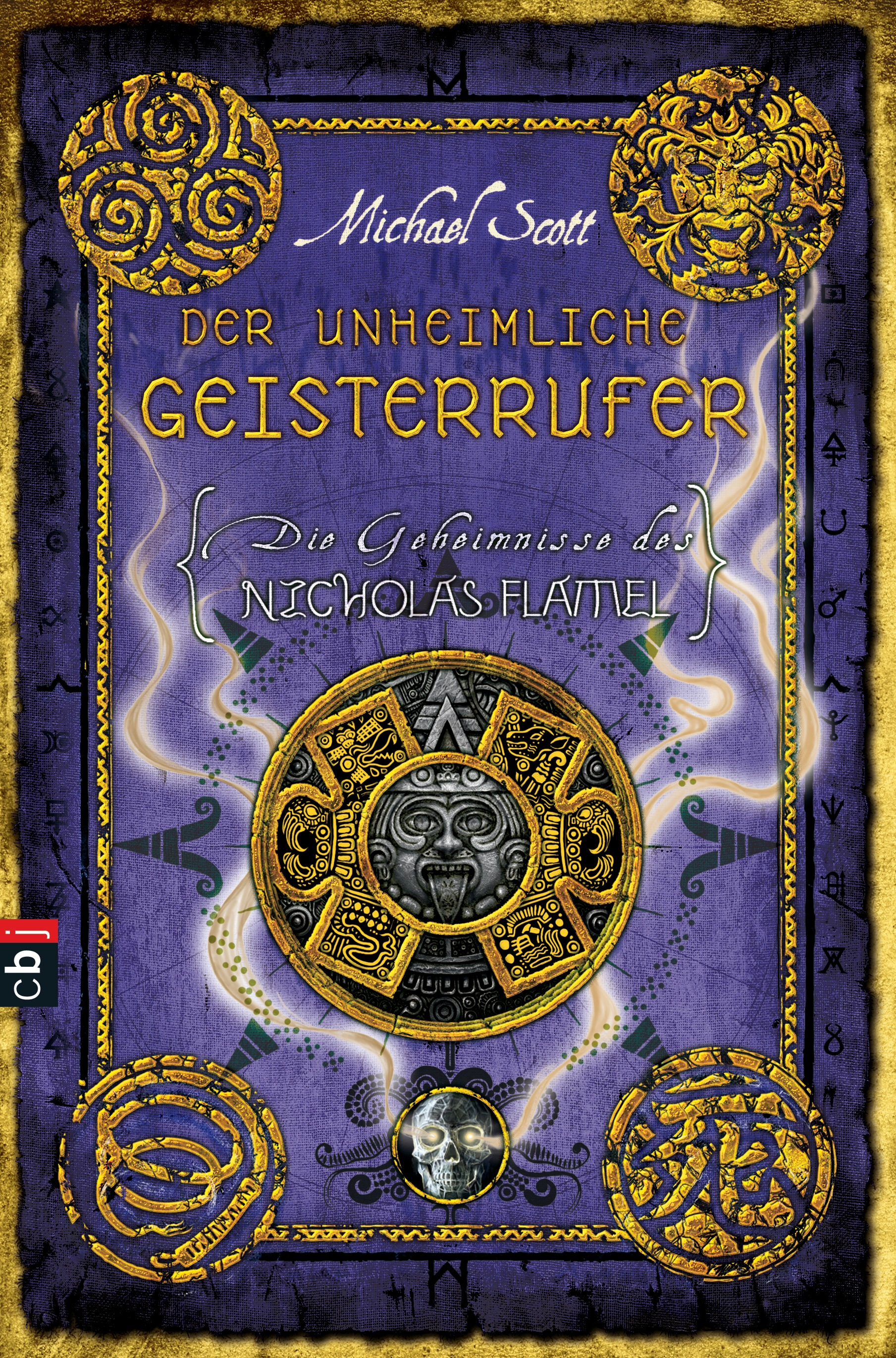 Michael Scott: Die Geheimnisse des Nicholas Flamel. Der unheimliche Geisterrufer. cbj, München 2011. DNB